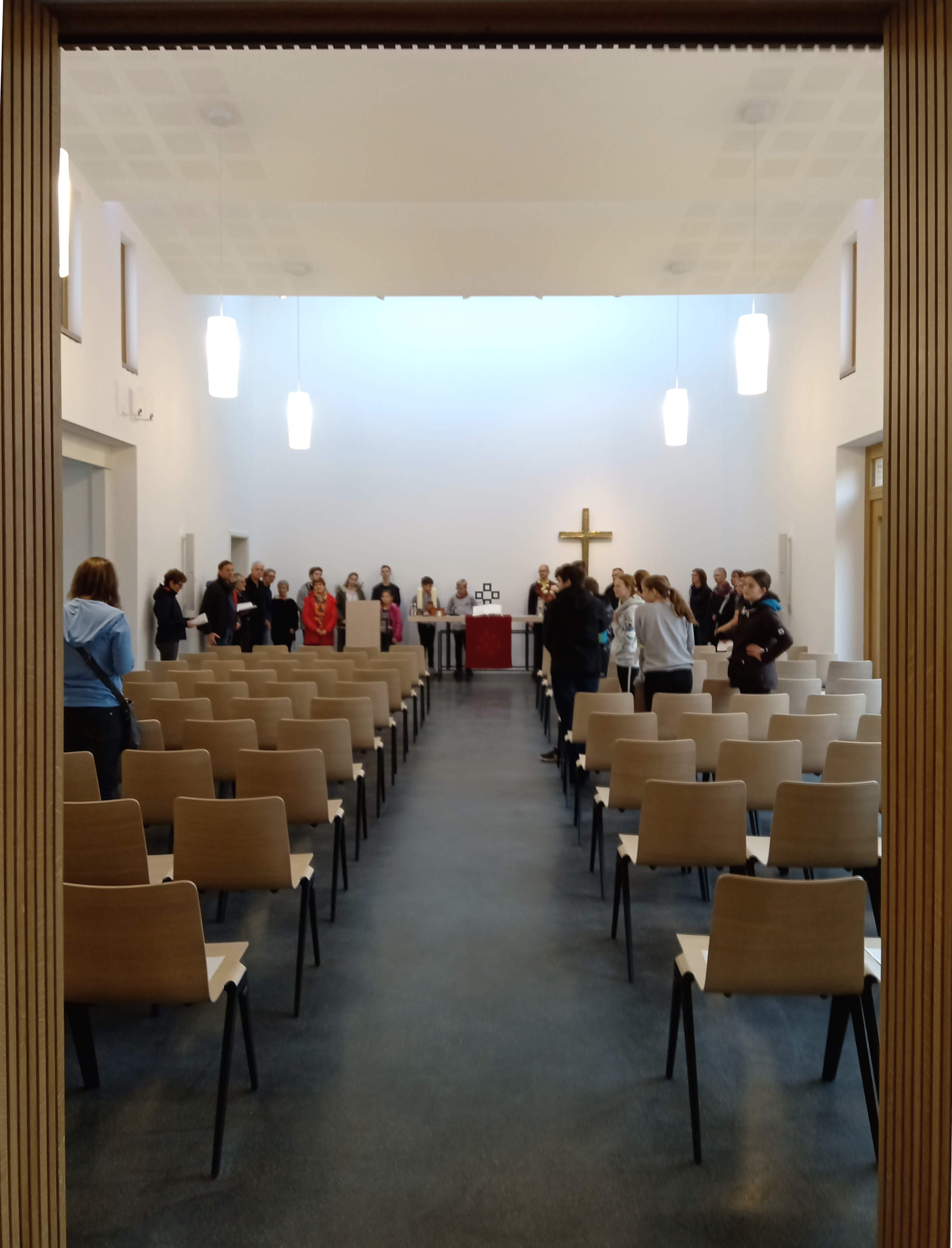 Innenraum mit Altarraum November 2019